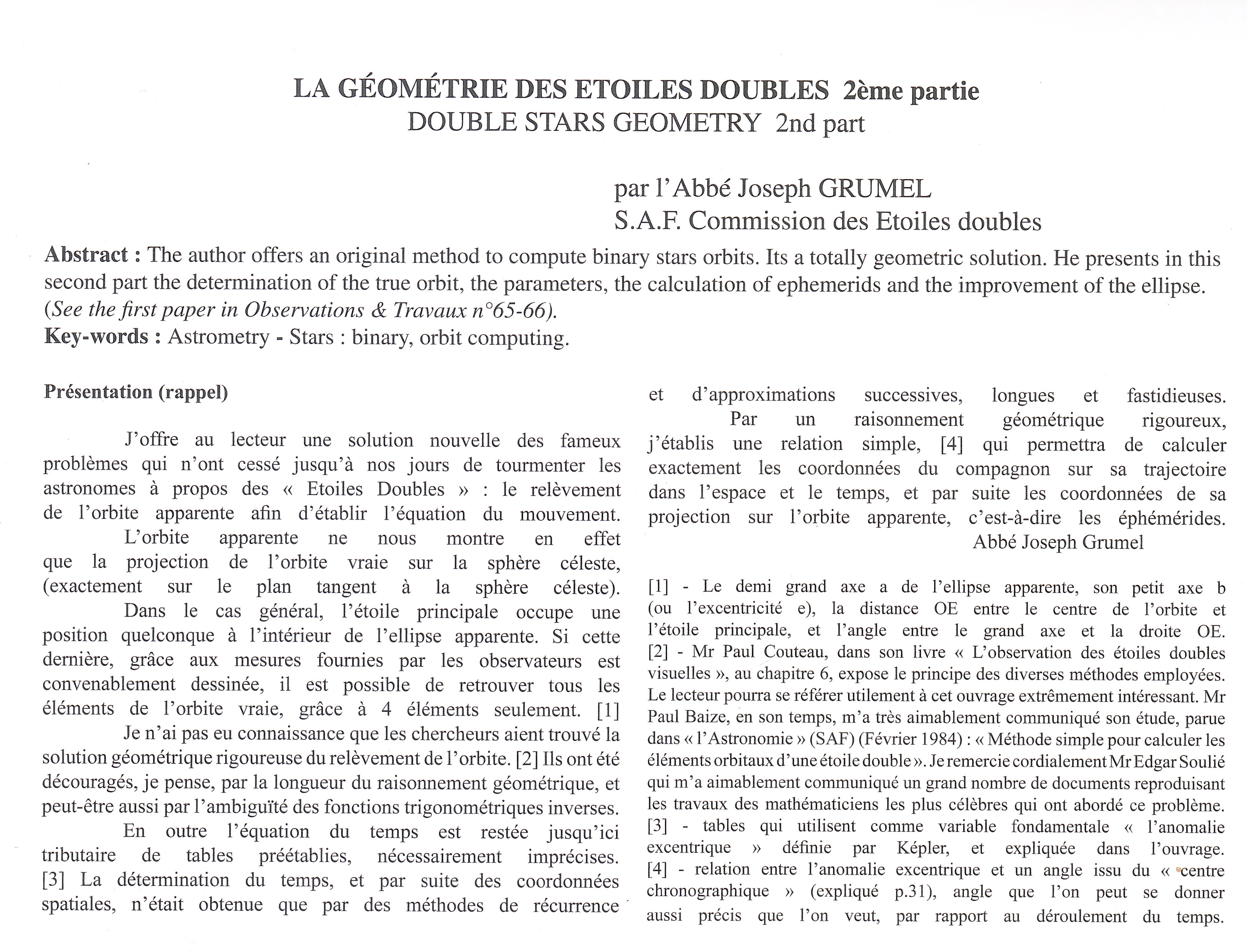 La géométrie des Etoiles doubles